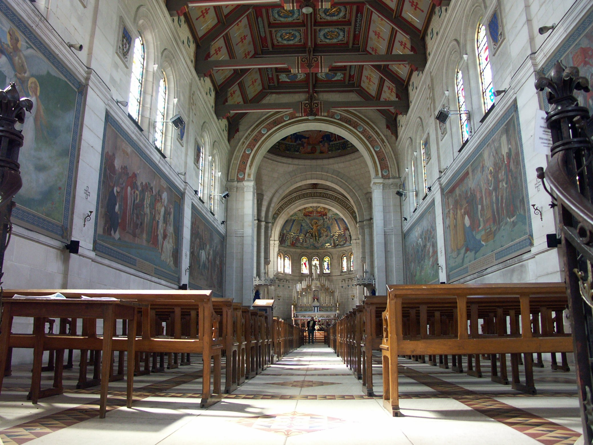 Domrémy-la-Pucelle (Vosges) Basilique du-Bois-Chênu - Vue vers Abside